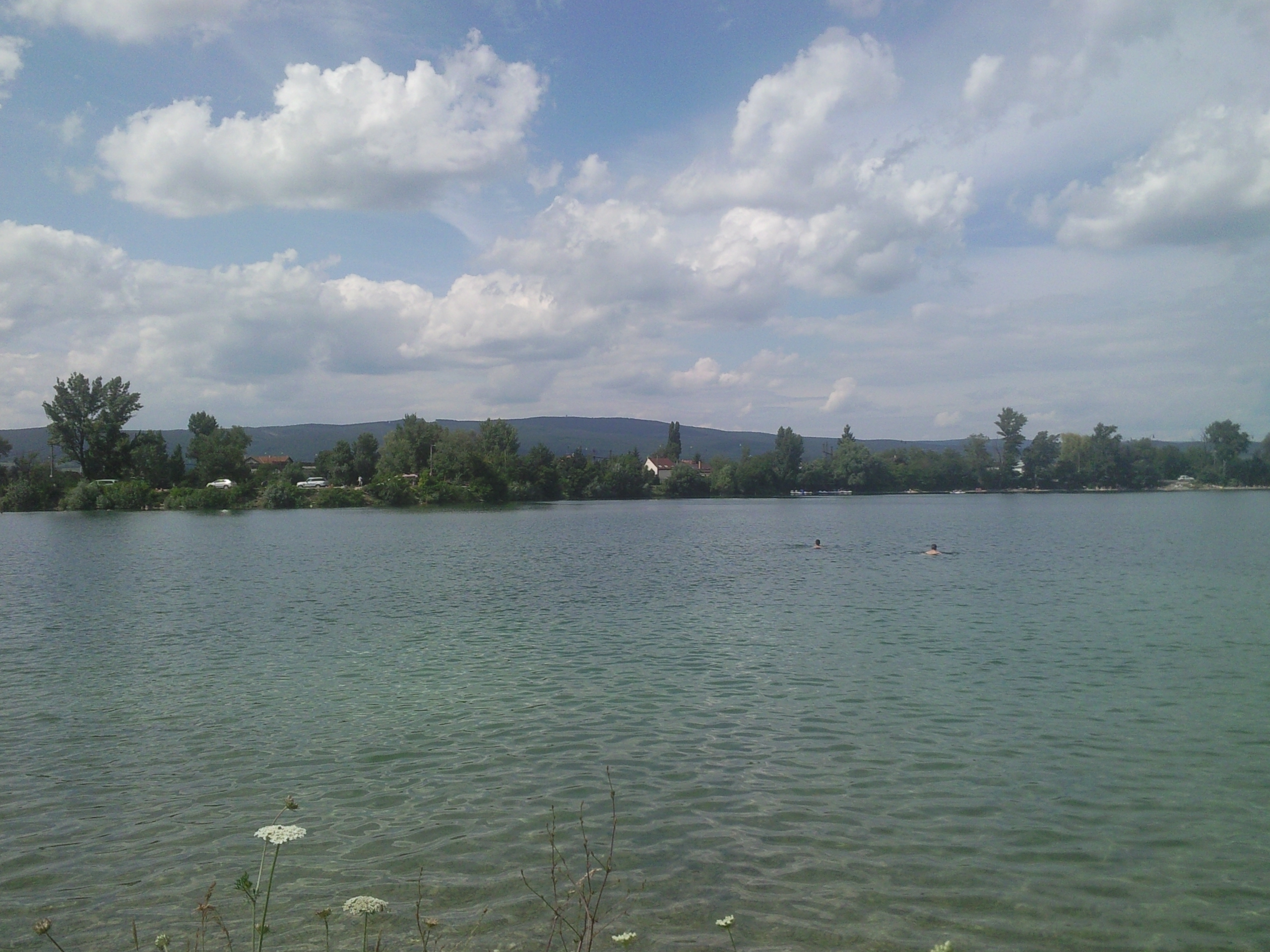 Vajnorské jazero, Veľký Bager